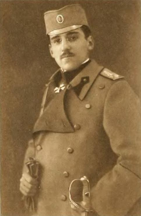 Retrato de Alejandro I de Yugoslavia durante la Primera Guerra Mundial, entonces como regente del Reino de Serbia.